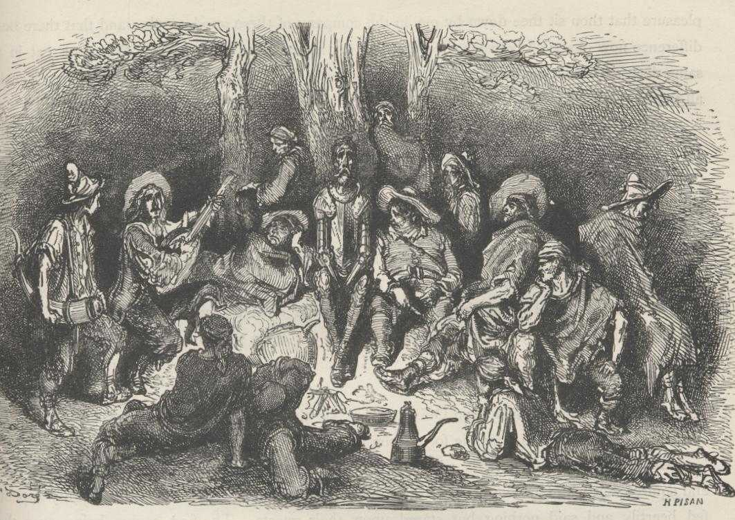 "A Balada do cabreiro António" (1863), iIustração por Gustave Doré para “Don Quixote“ de Miguel de Cervantes.